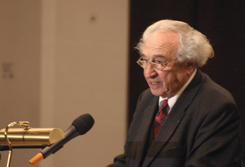 Max Mannheimer, Überlebender des Holocaust und jüdischer Buchautor im November 2005 in München (aufgenommen im Saal des alten Rathauses).